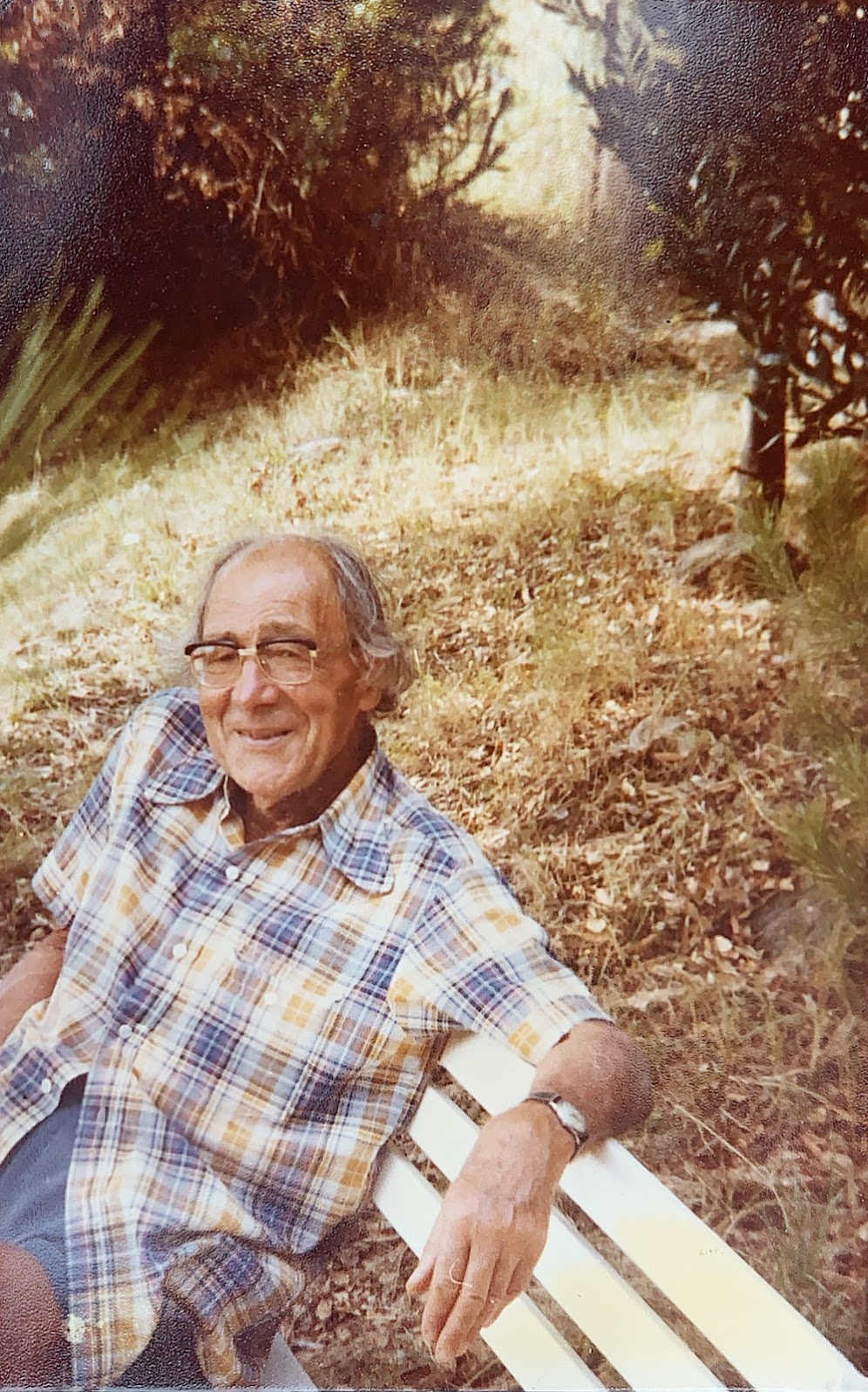 Une photo de Jean-Jacques Mayoux